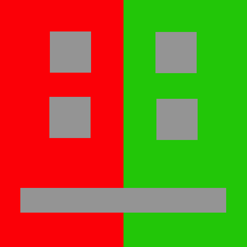 Simultankontrast, graue Quadrate erscheinen auf rotem Grund blau-grünlich und auf grünem Grund rötlich